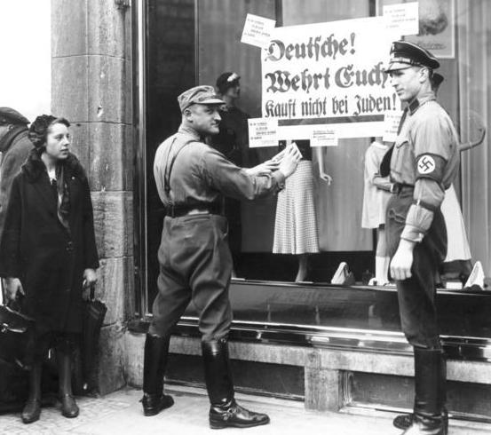 An den Fenstern jüdischer Geschäfte werden von Nationalsozialisten Plakate mit der Aufforderung "Deutsche, wehrt euch, kauft nicht bei Juden" angebracht.